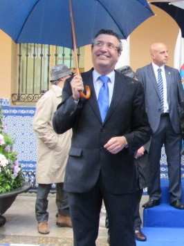 Javier Fernández de los Ríos en el Ayuntamiento de La Rinconada, en abril de 2016.